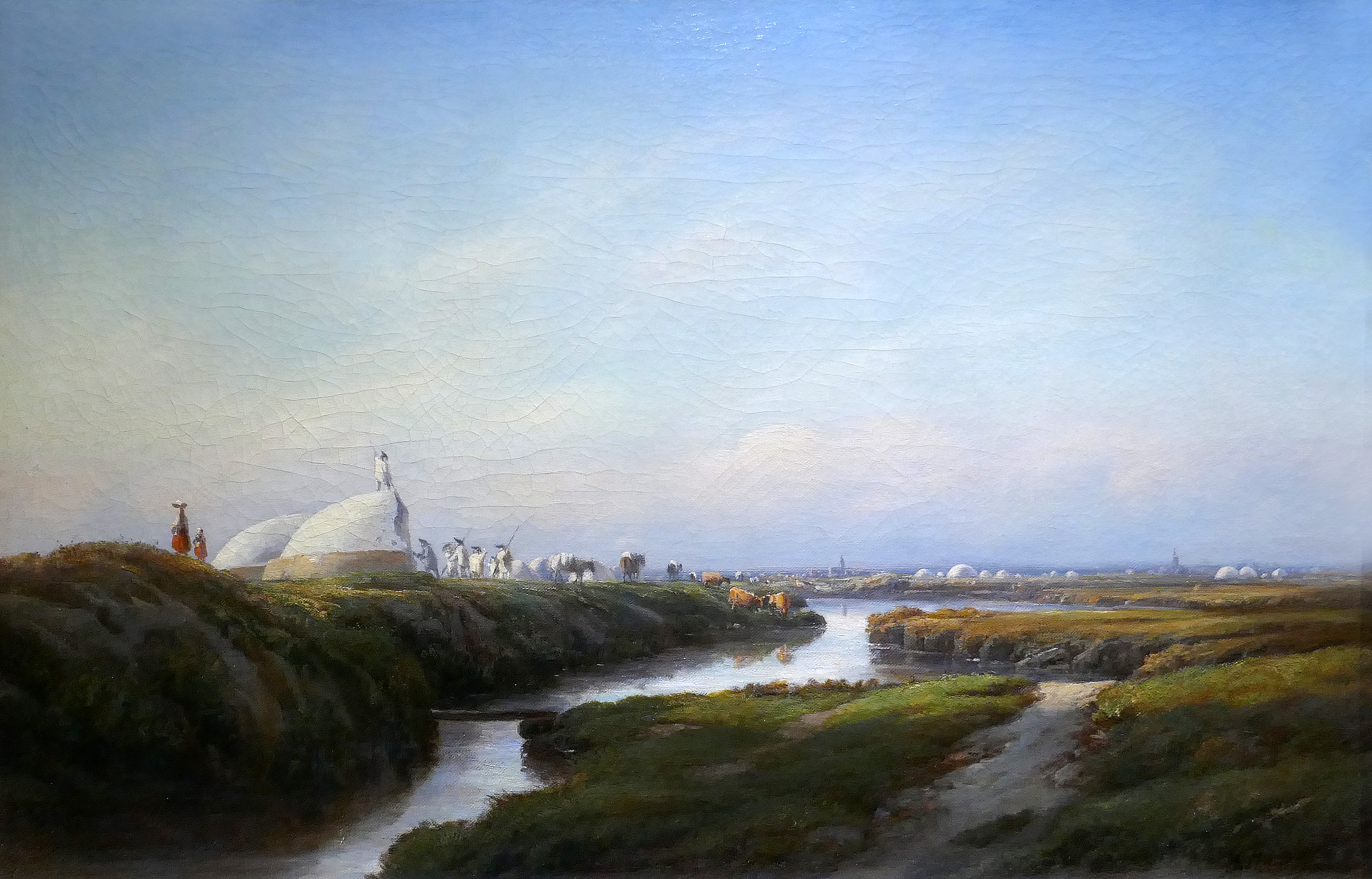 Frédéric-François d'Andiran, Livrage de sel. Huile sur toile. Vers 1855-1860. Musée des marais salants à Batz-sur-Mer (Loire-Atlantique).